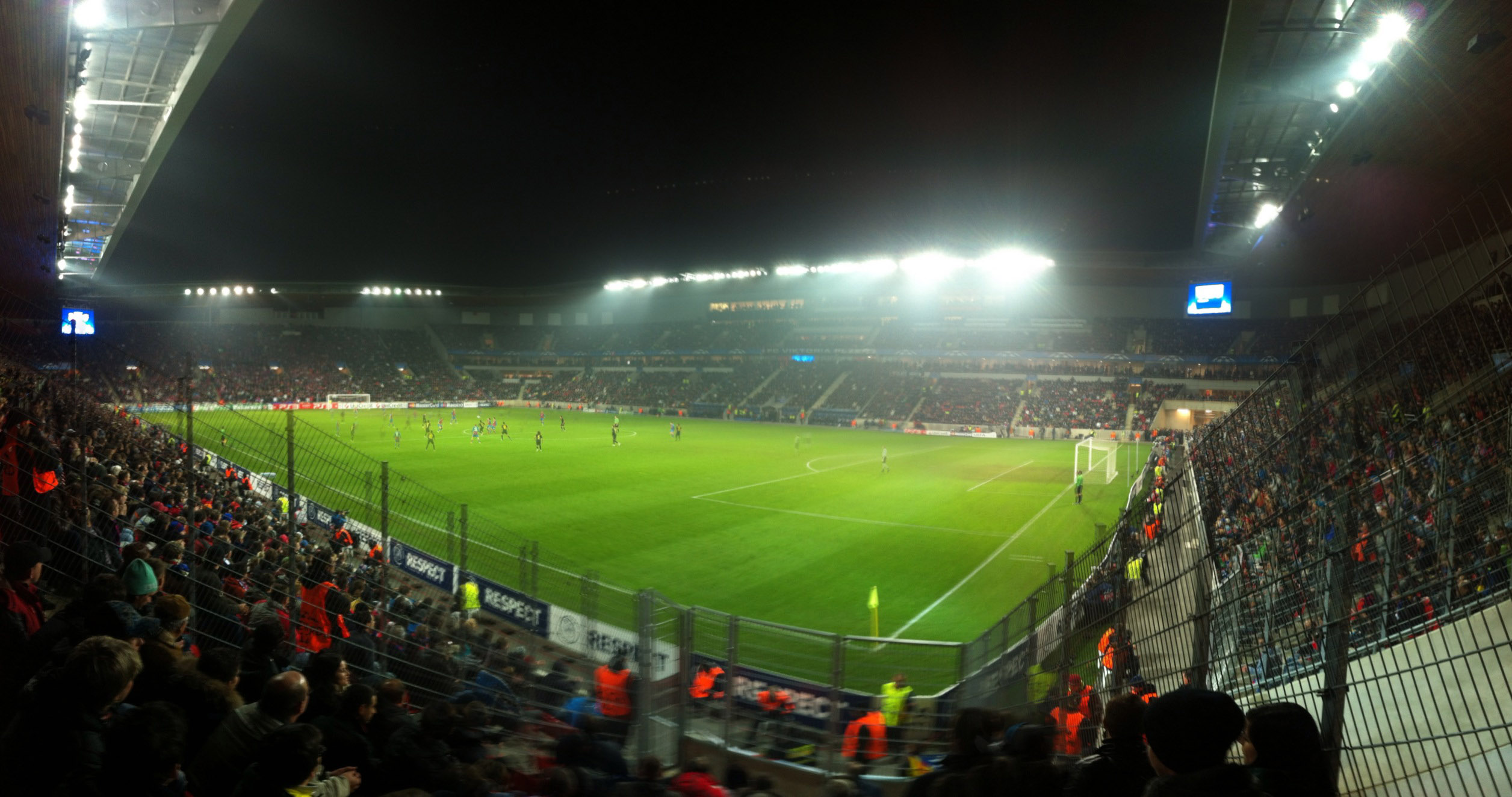 01-Nov-2011 Viktoria Plzen - FC Barcelona 0:4 Synot Tip Aréna, Praha (Panorama)